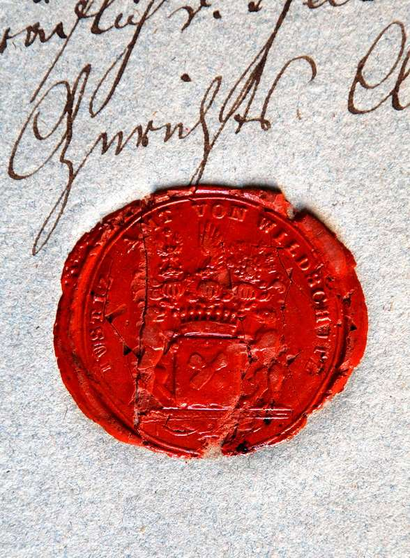 Zdjęcie pieczęci urzędu w Wiltschutz. Pieczęć Urzędu pracy w Wiltschutz z herbem Graf von Pfeil